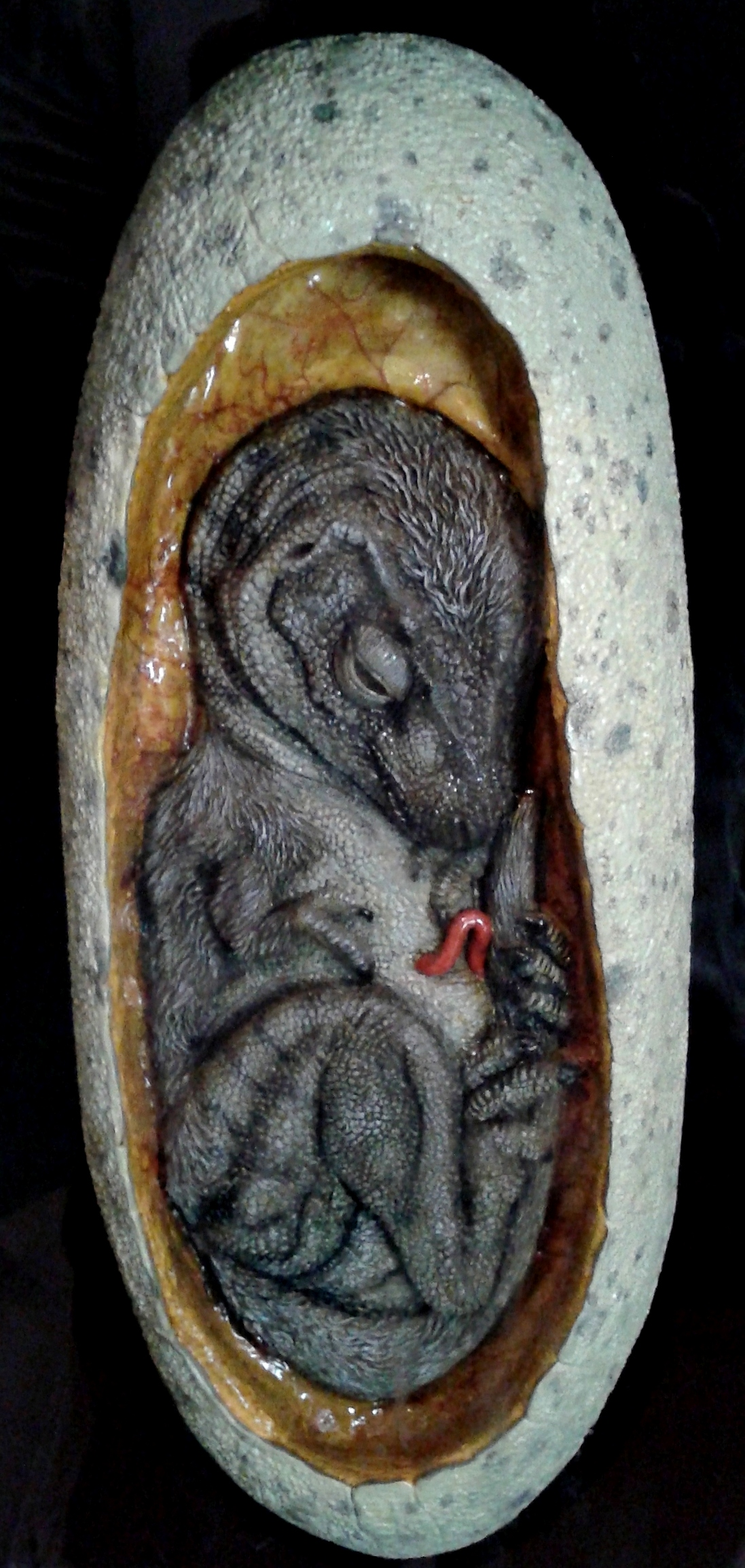 Português do Brasil: Proposto artística para embrião e ovo de Tyrannosaurus rex com base em descobertas na China de ovos atribuídos a dinossauros carnívoros de grandes dimensões. Acervo do Museu Nacional/UFRJ, Rio de Janeiro, Brasil.